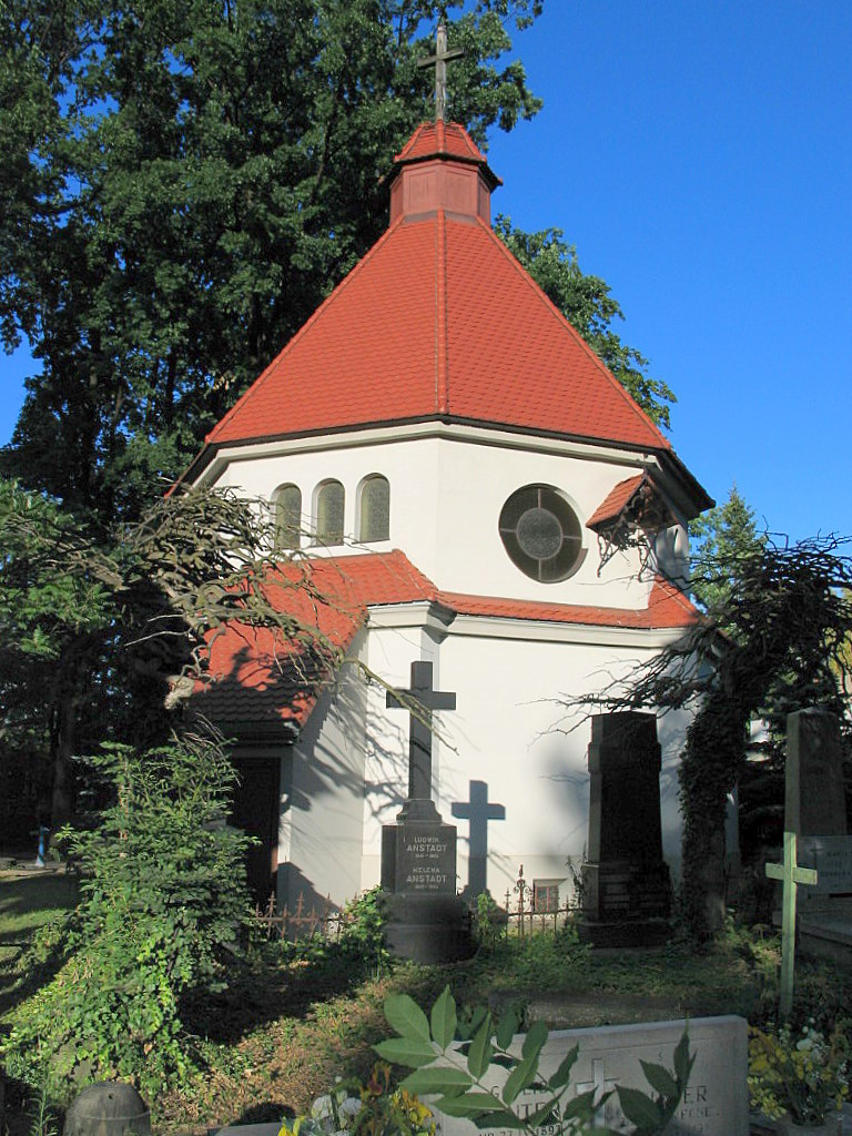 cmentarna kaplica ewangelicka Łódź